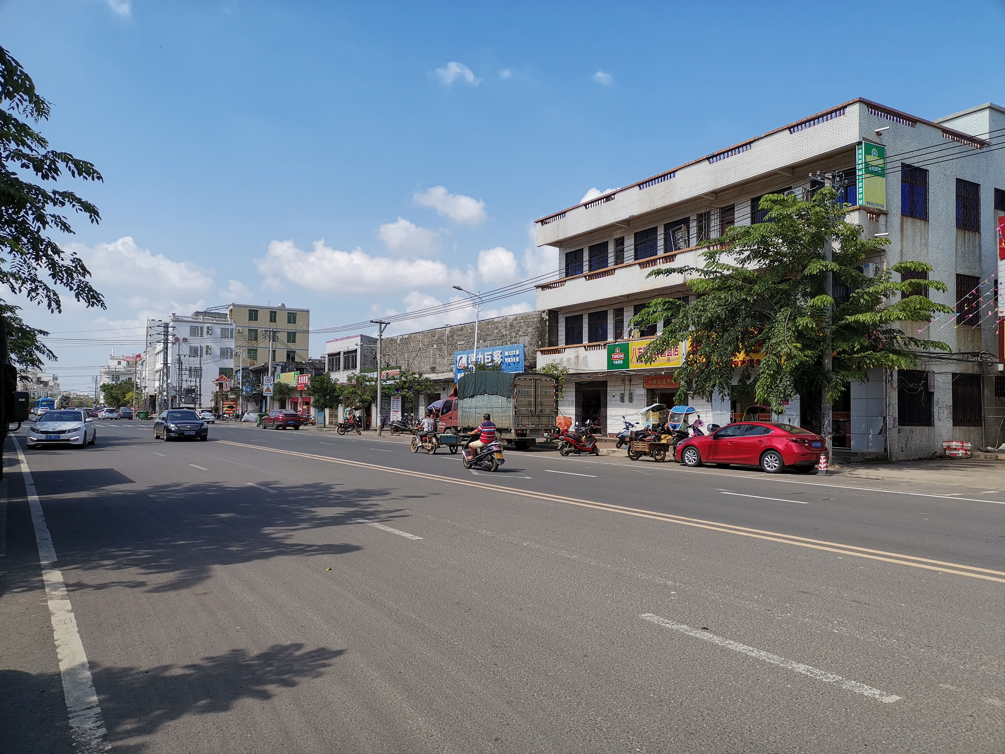 中文（中国大陆）: 文昌市與海口市交界處海口一側